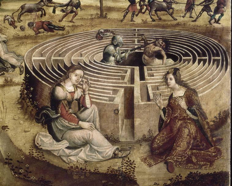 detail